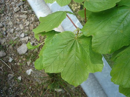 Francesco Stuppello, Acero di Ungheria - Tortora (CS)